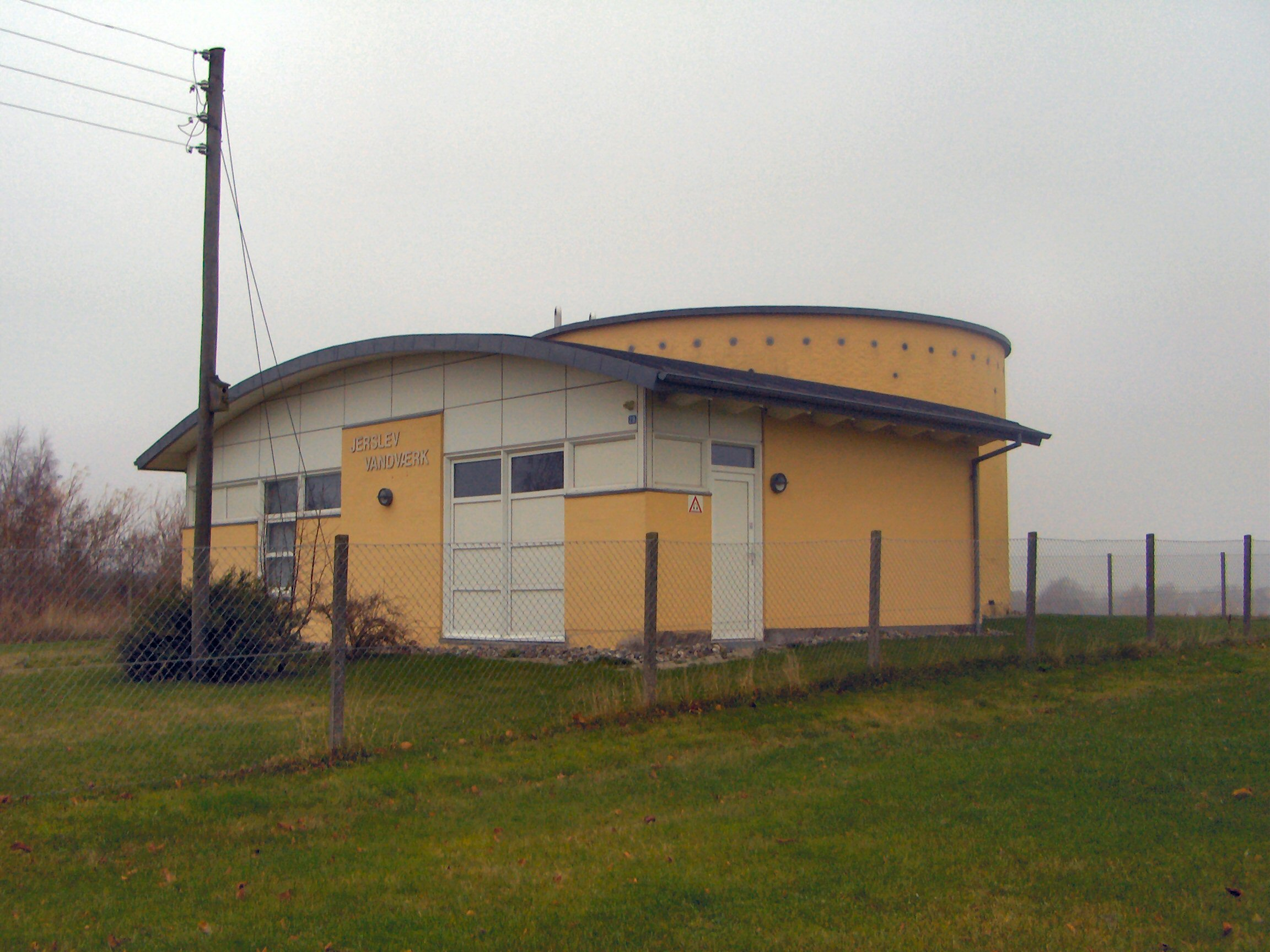 Jerslev Vandværk i Kalundborg Kommune